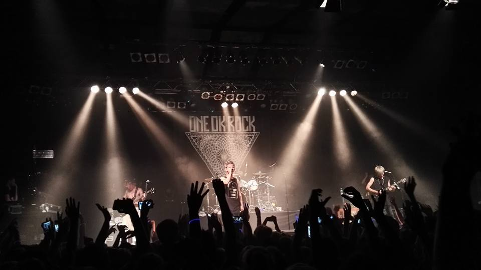 Progresja, 01.06.2016 r.